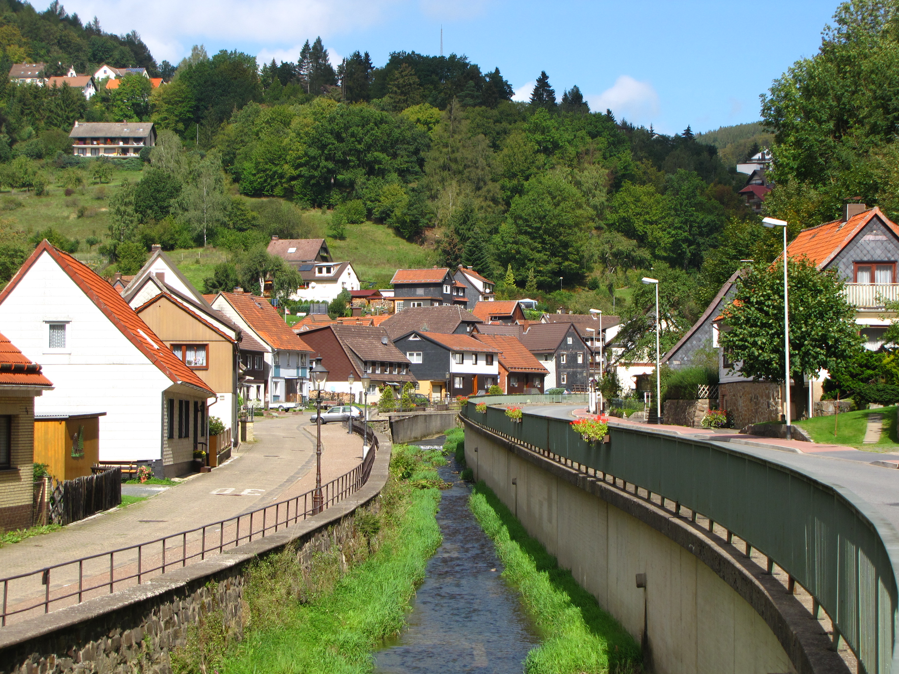 Die Wieda im Gleichnamigen Ort